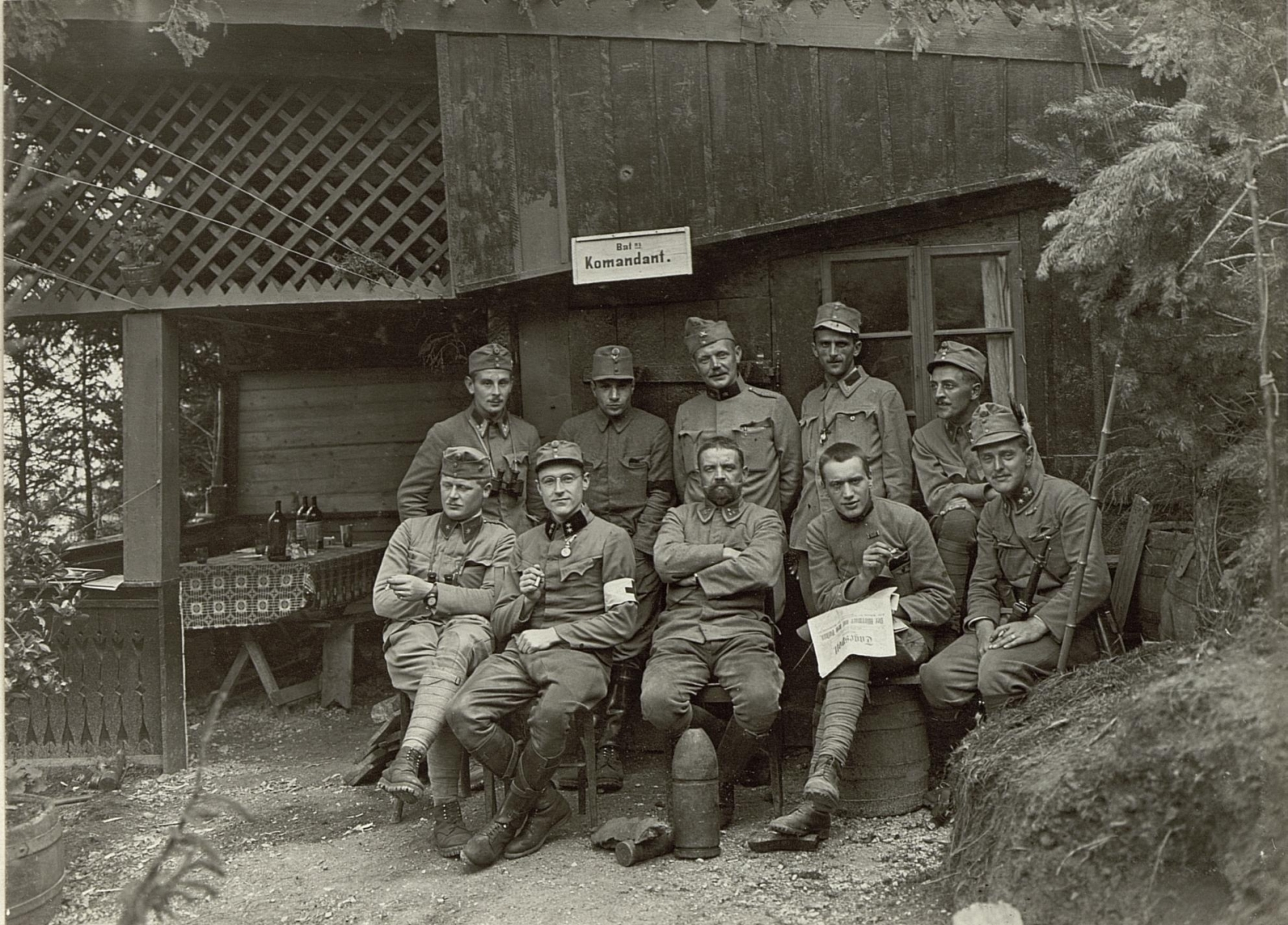 Bataillonskommando des Feldjäger Bataillons Nro. 20.